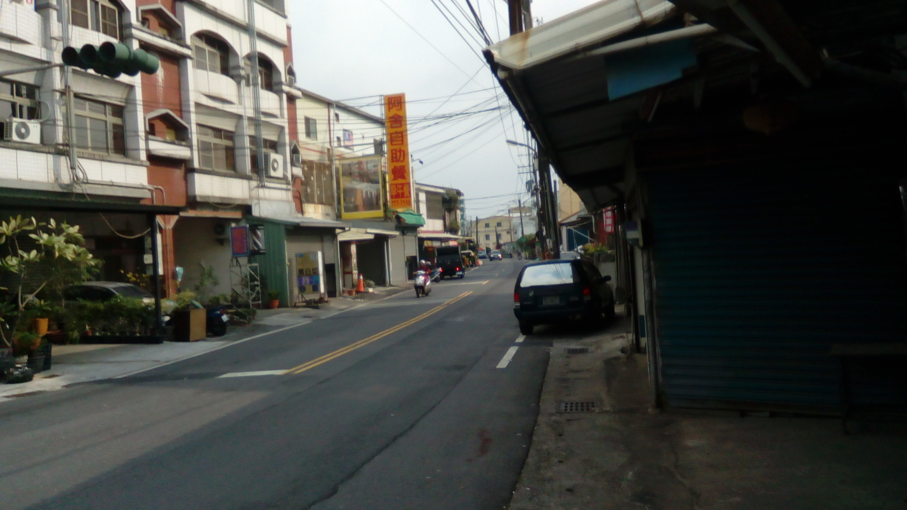 萬丹南部的聚落 規模約3000人